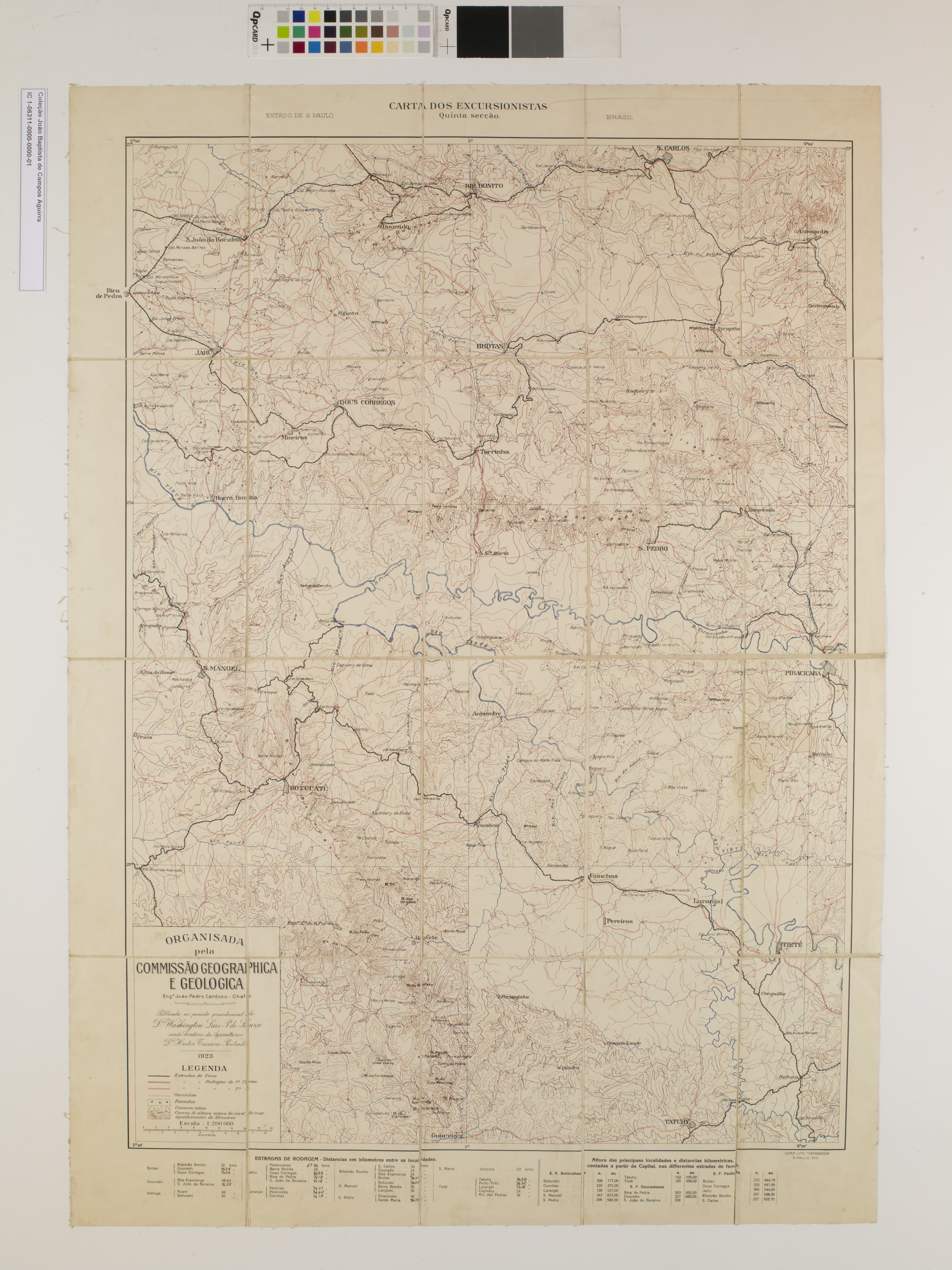 Obra que integra o acervo do Museu Paulista da USP. Coleção João Baptista de Campos Aguirra - Ref. Agente: Seção Cia. Litográfica Ipiranga